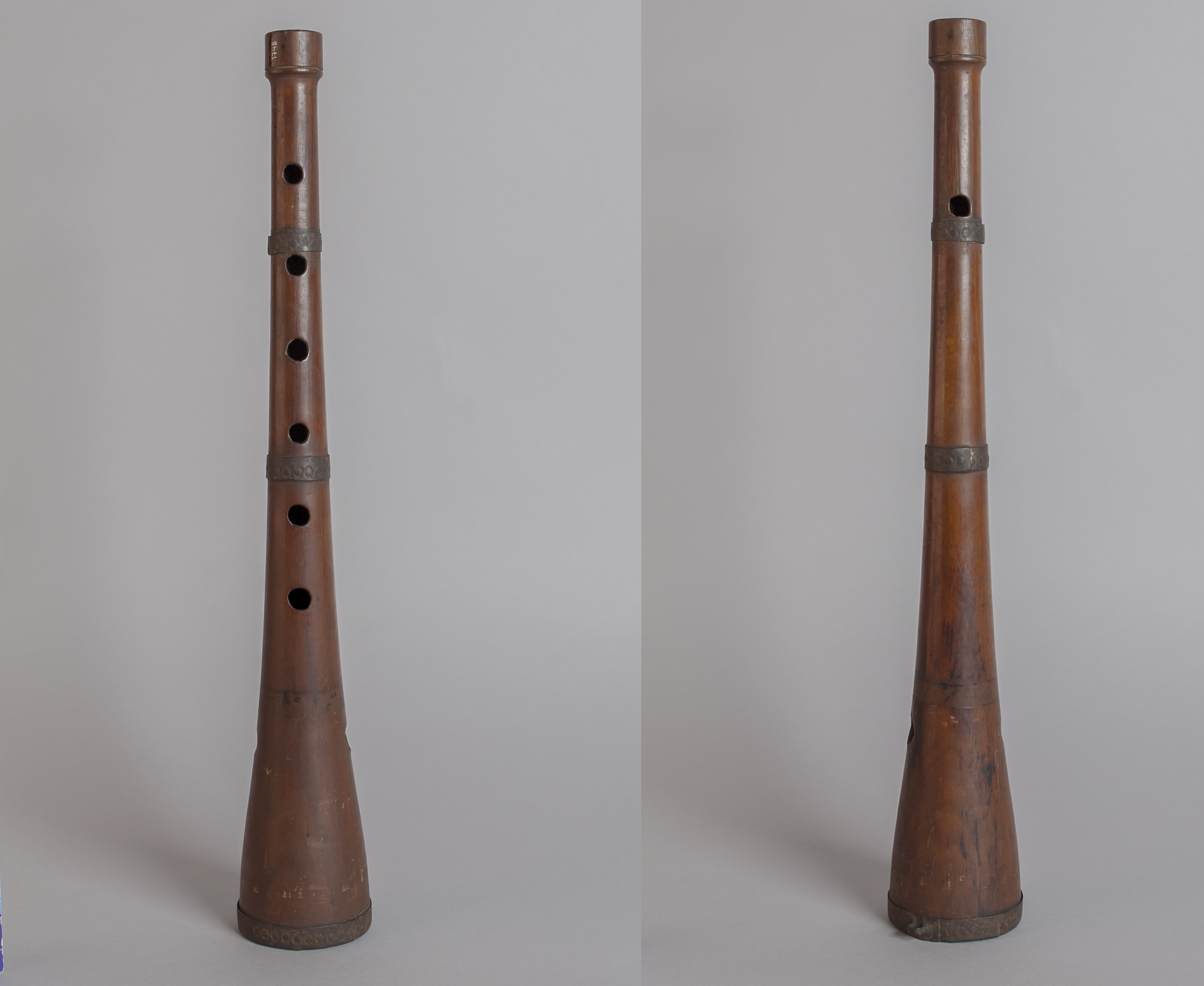 Gralla, segle XIX, MDMB 1748